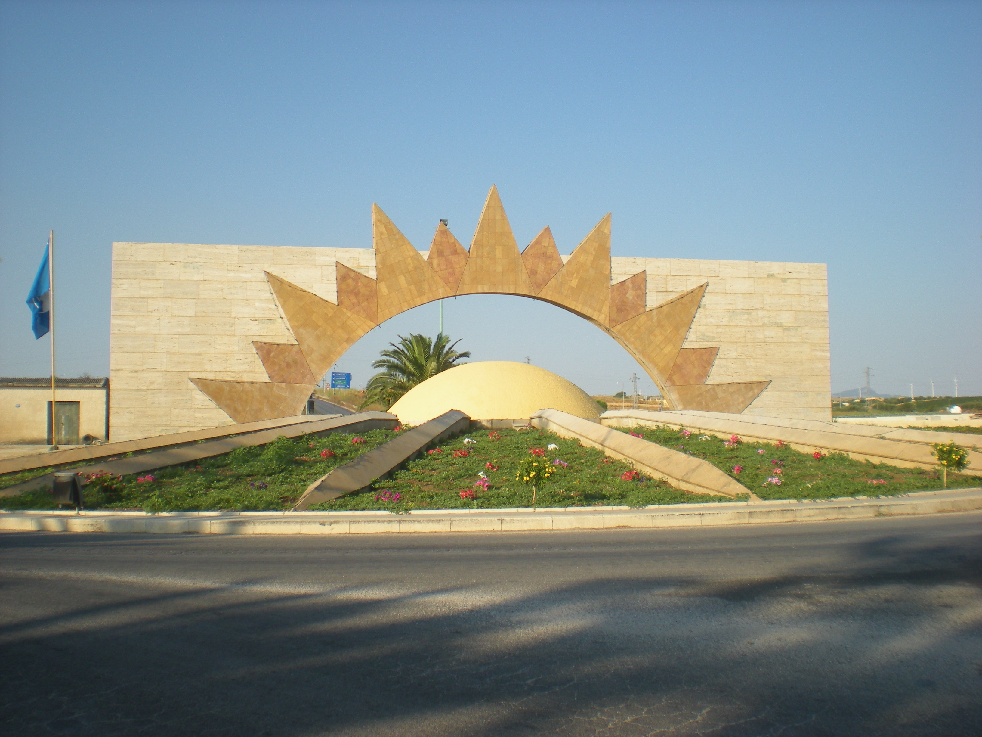 Sole Nascente, Menfi